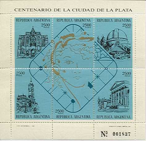 Es el sello emitido en 1982 en conmemoración a los primeros 100 años de la ciudad de La Plata.